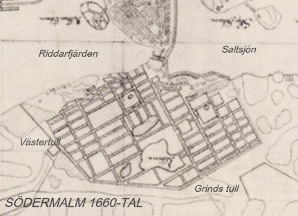 "Grundris der Schwedischen Residenz", del som visar Södermalm